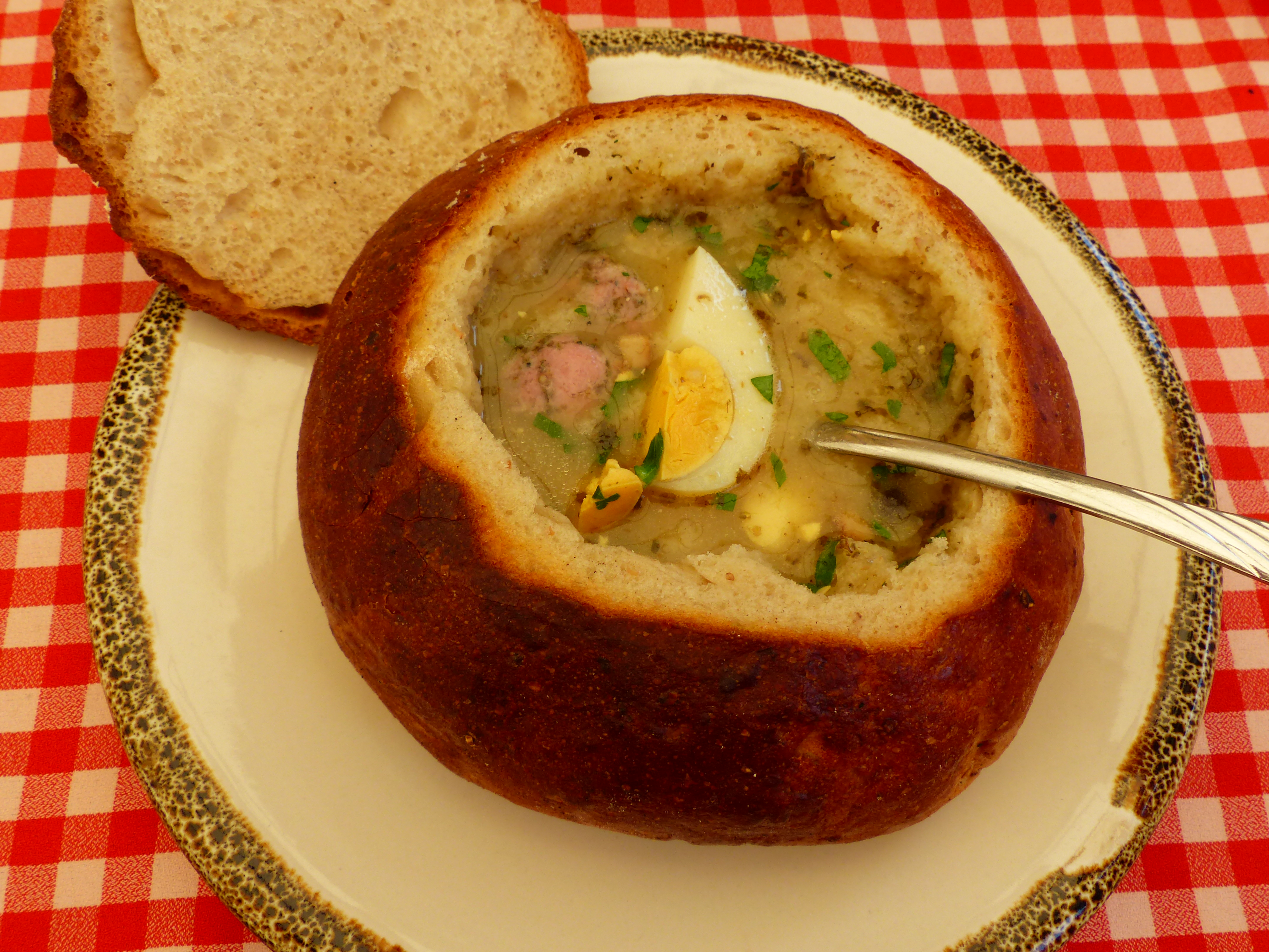 Polnische Suppe Zurek - im Brot mit Ei und Weisswurst; Restaurant am Rathaus von Breslau: Pod Fredra Restauracja, Wroclaw / Breslau